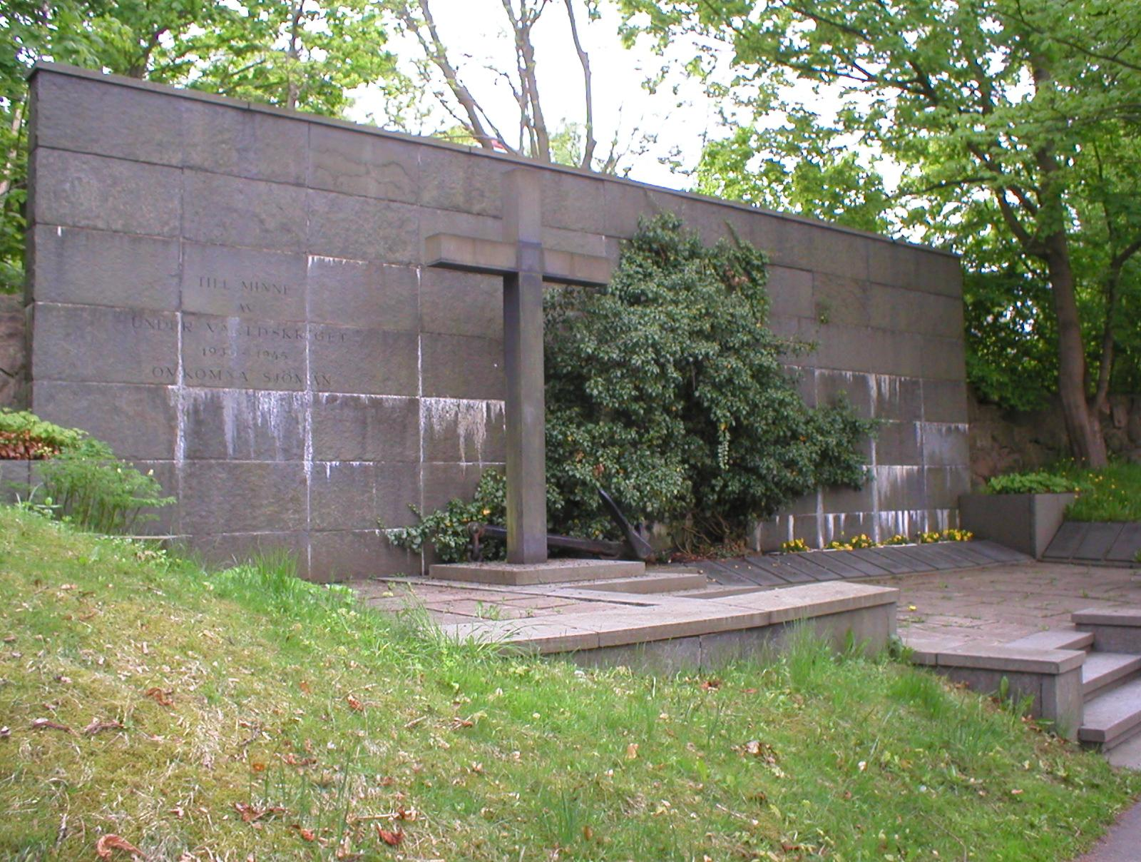 Foto av minnesmärke för sjömän omkomna under andra världskriget, Mariebergskyrkogården, Majorna, Göteborg. Invigt 1943. Arkitekt:Gotthard Ålander